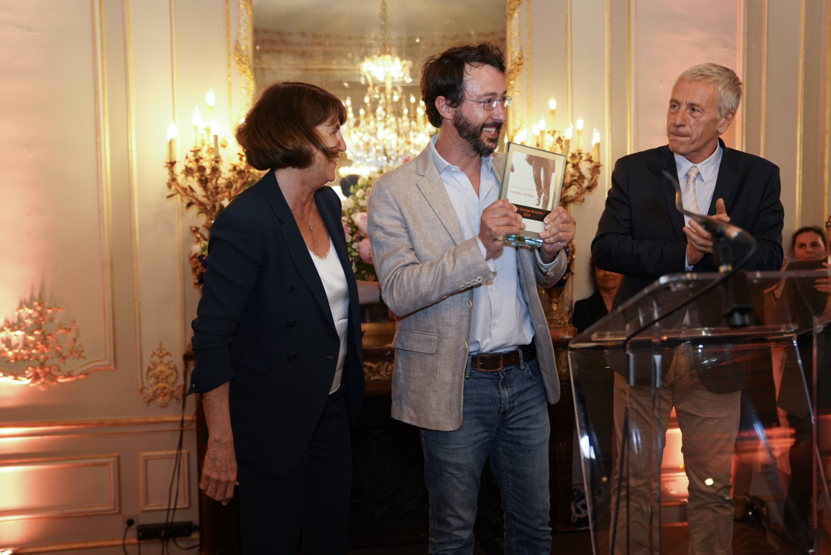 Jean-Baptiste Maudet reçoit le Prix Orange du Livre 2019 des mains de Christine Albanel et de Jean-Christophe Rufin, pour son roman Matador yankee (Le Passage).